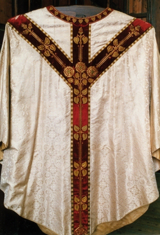 Rozenkazuifel A.E.Grossé 1925